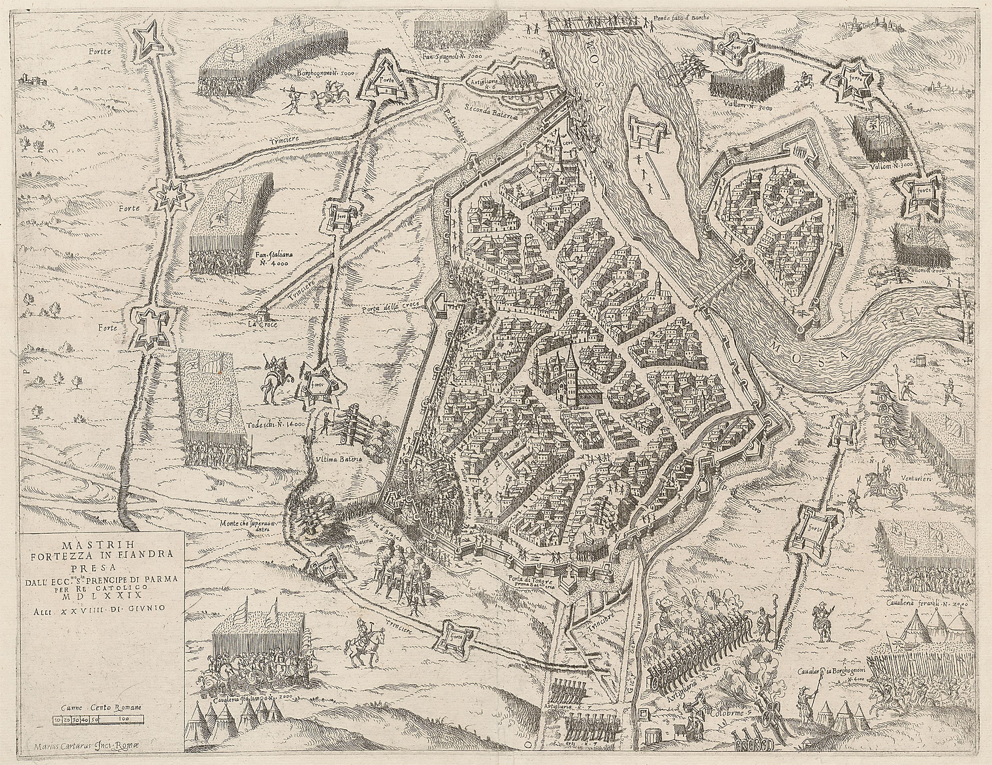 Cartaro, Mario: Mastrich fortezza in Fiandra ...; Kupferstich, um 1580